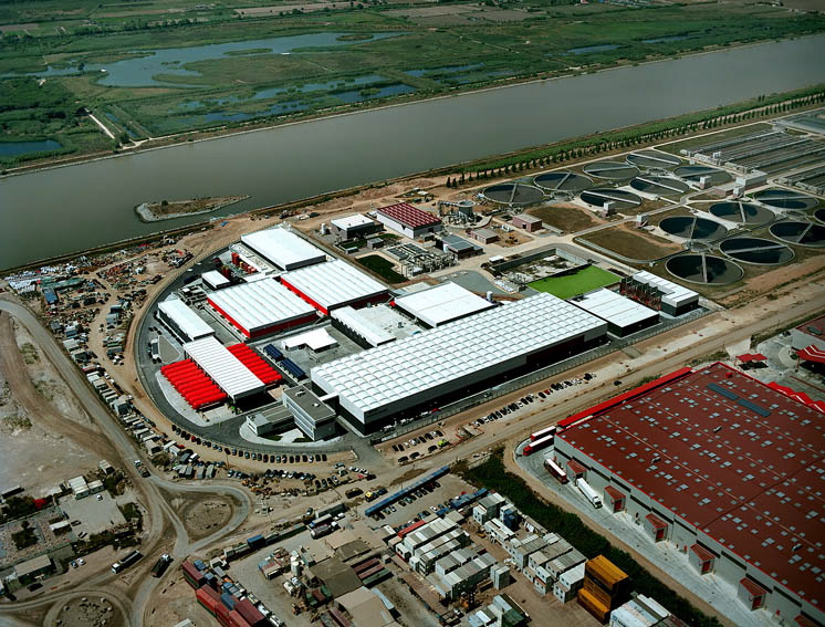 Planta Dessalinitzadora del Riu Llobregat